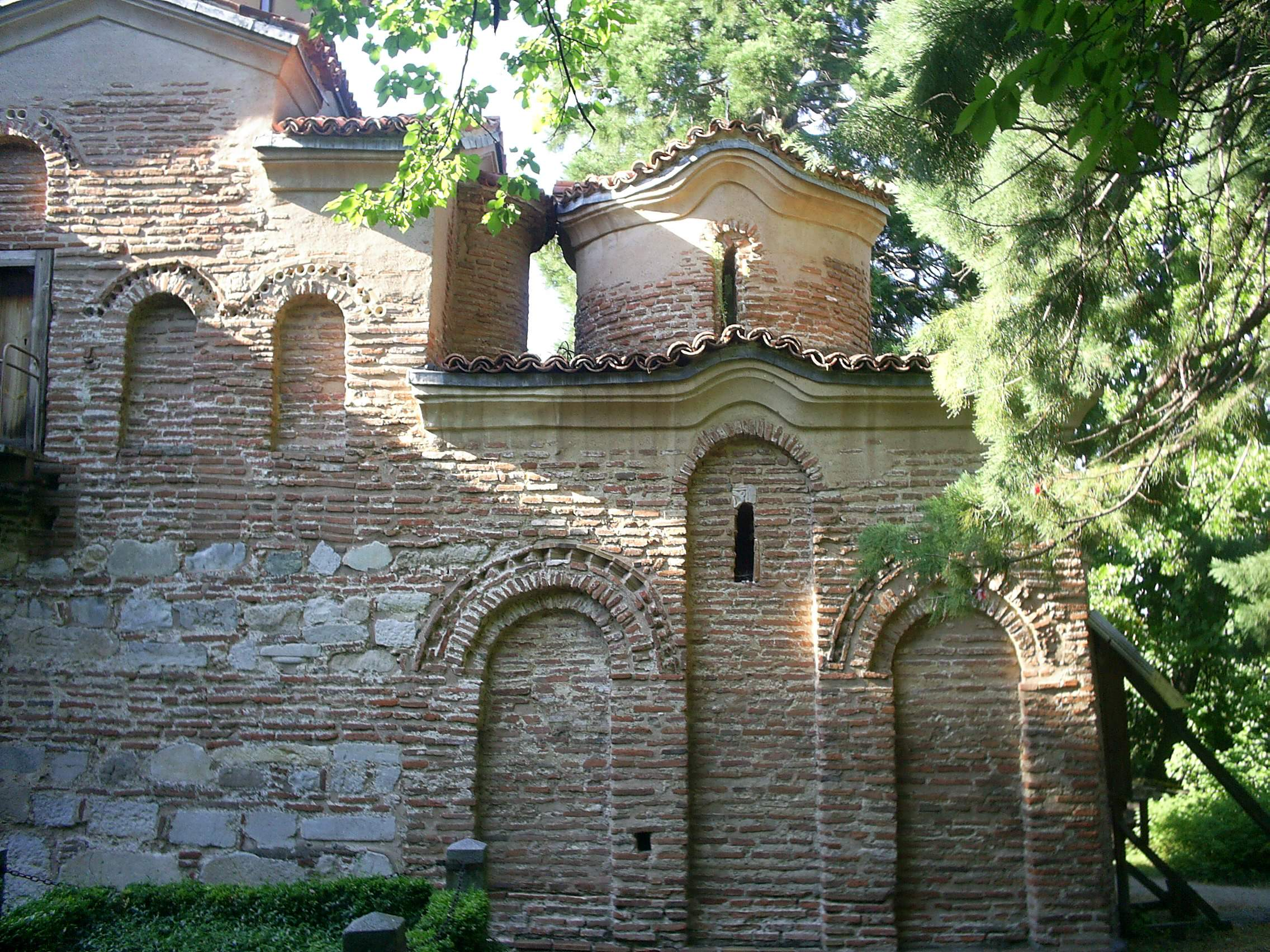 Boyana Church, Bulgaria.